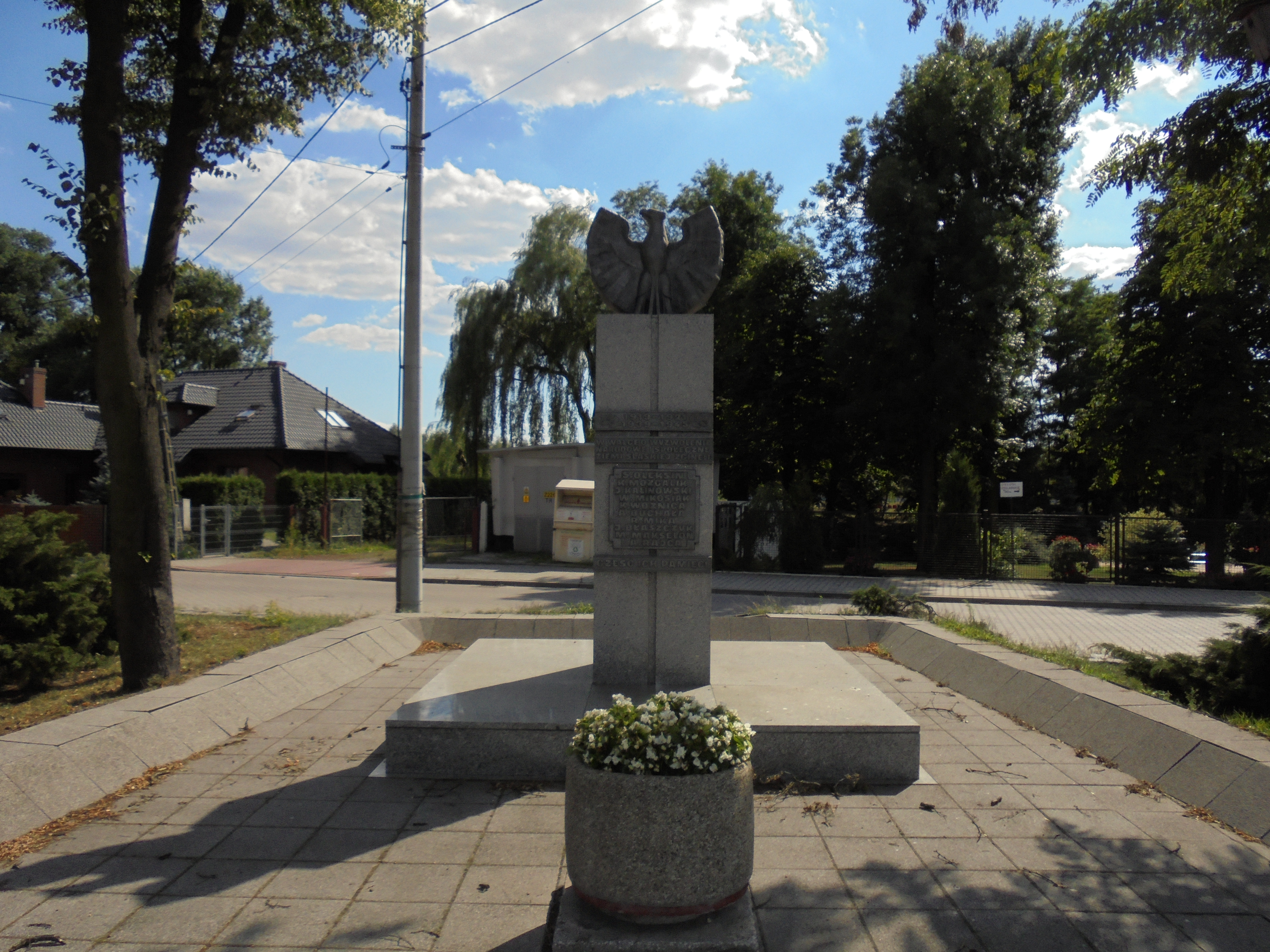 Pomnik upamiętniający poległych polskich żołnierzy.